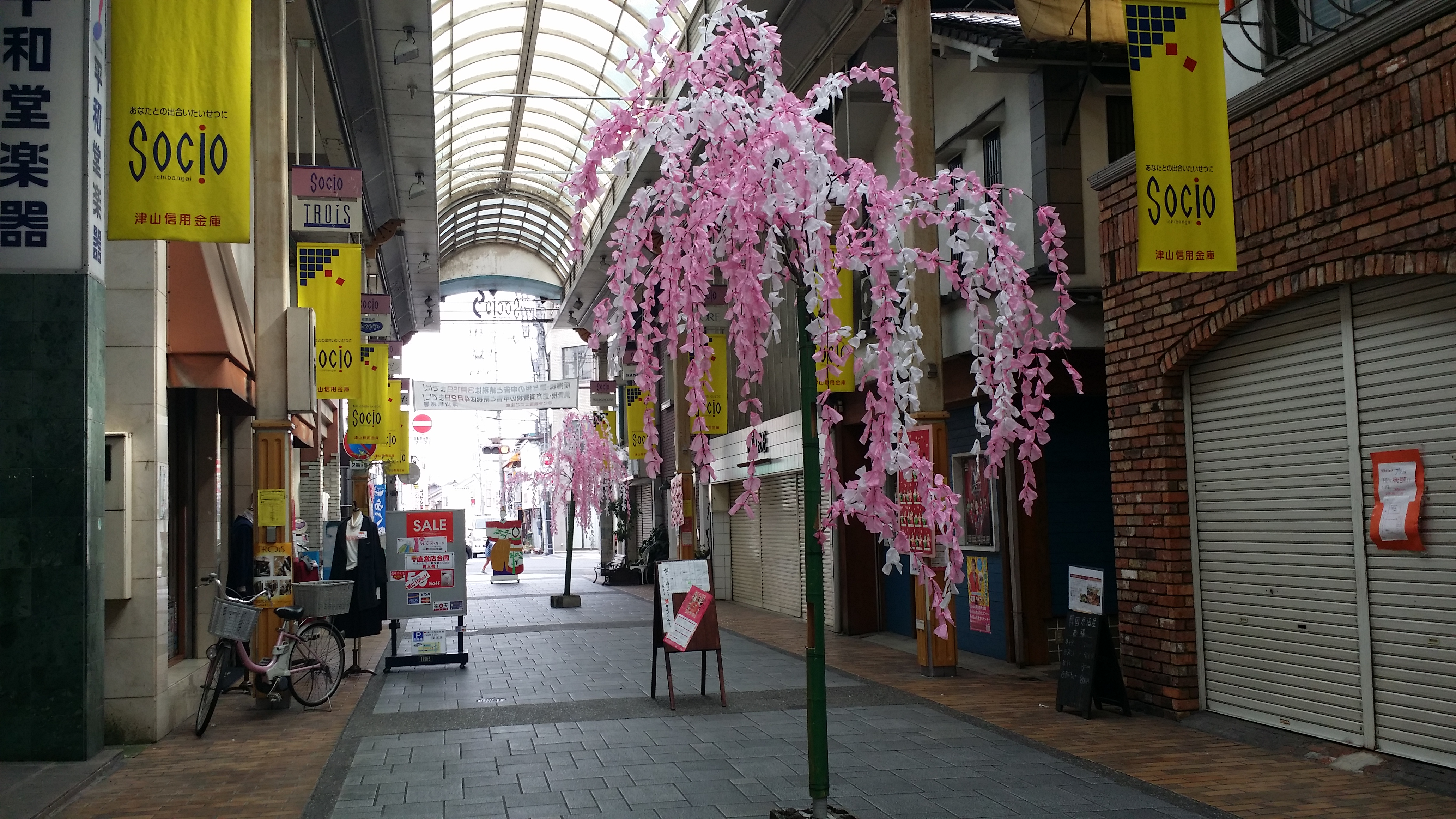 津山市の商店街